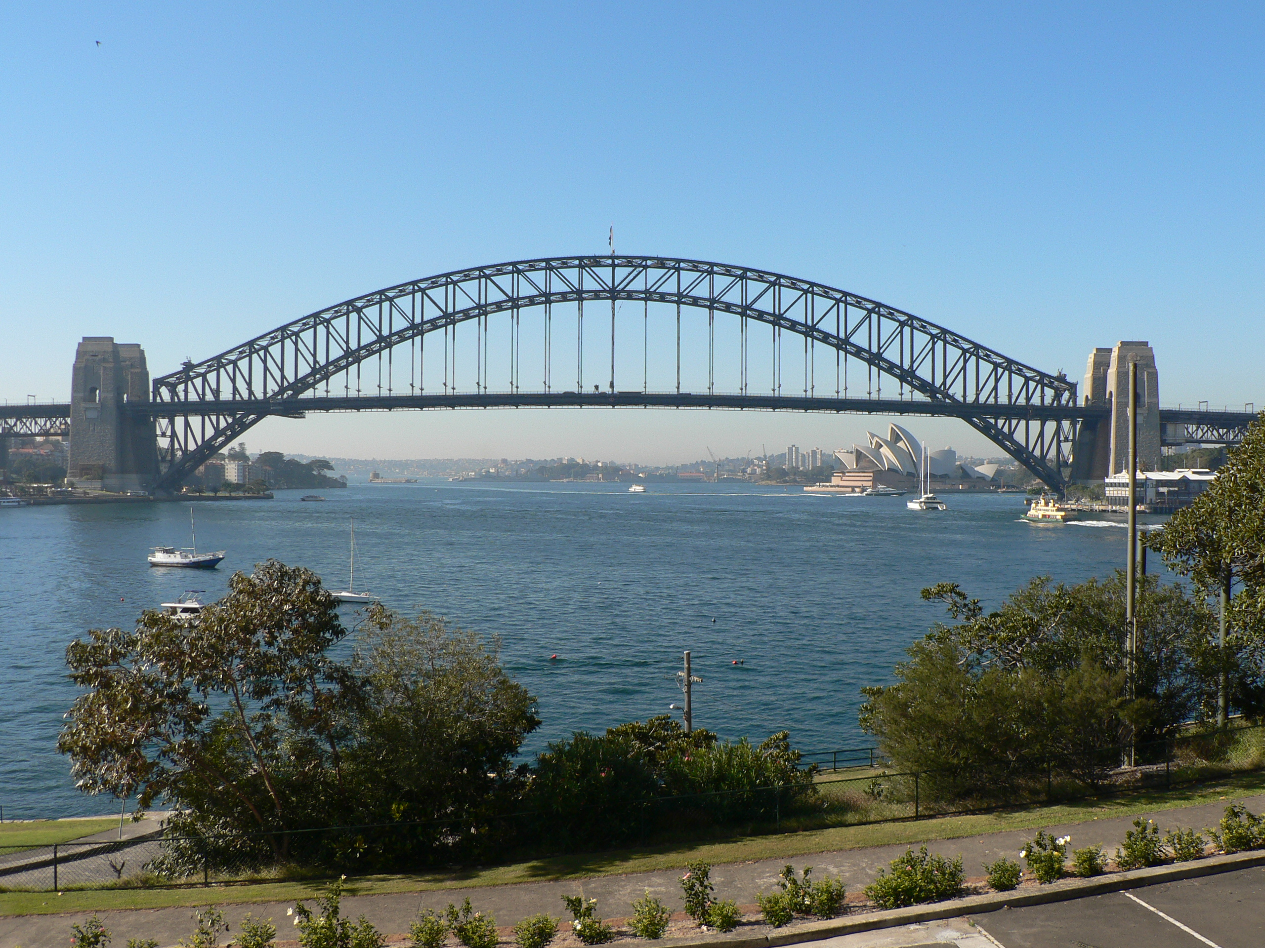 autor: Kolamil Sydney Australia-Harbour bridge v pozadi Opera house